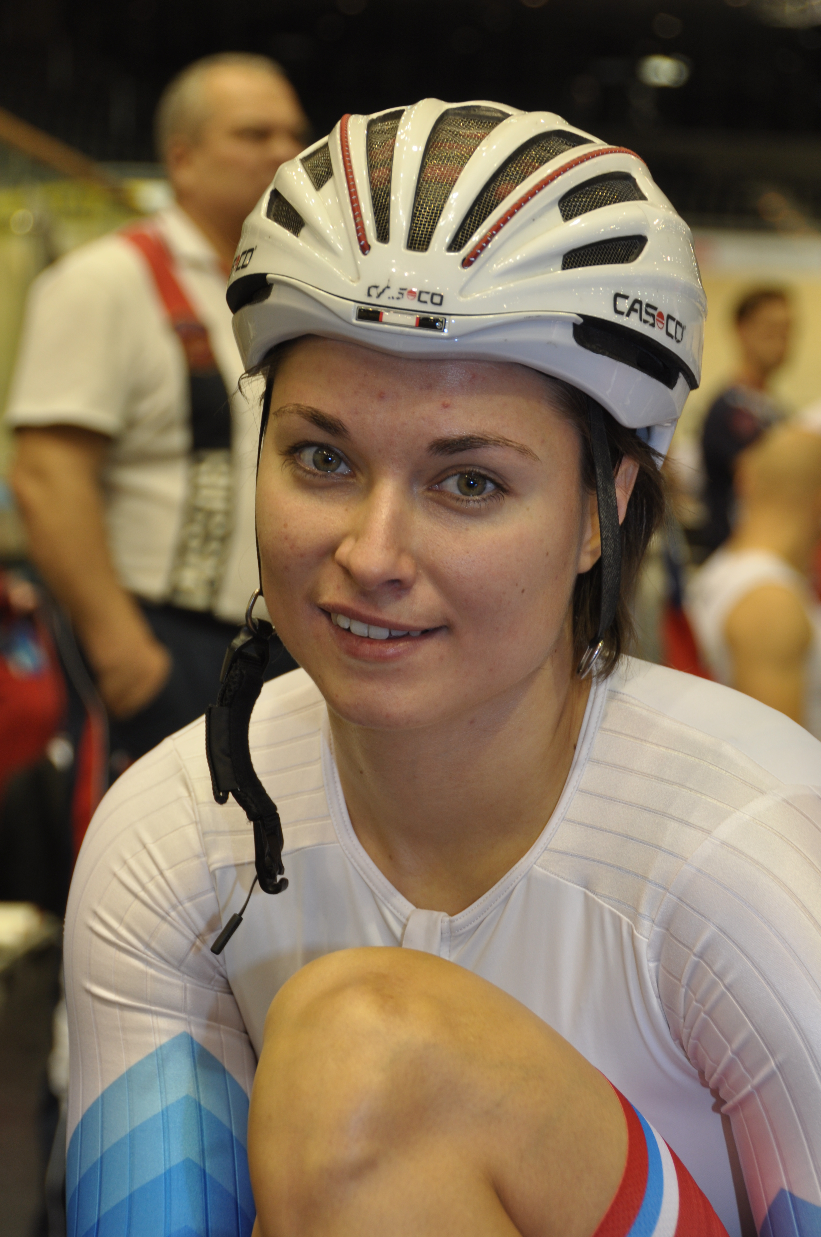 Ekaterina Gnidenko, russische Radsportlerin